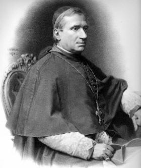 Cardinal Lorenzo Barili